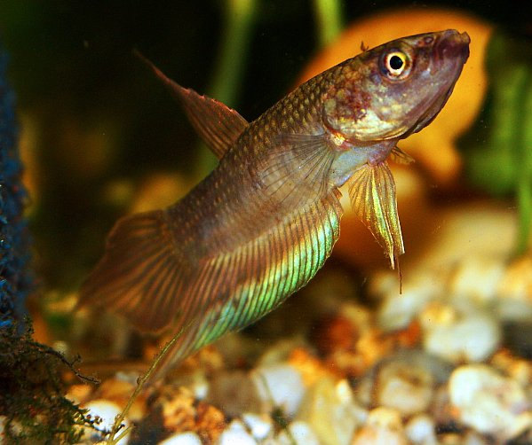 Betta dimidata male